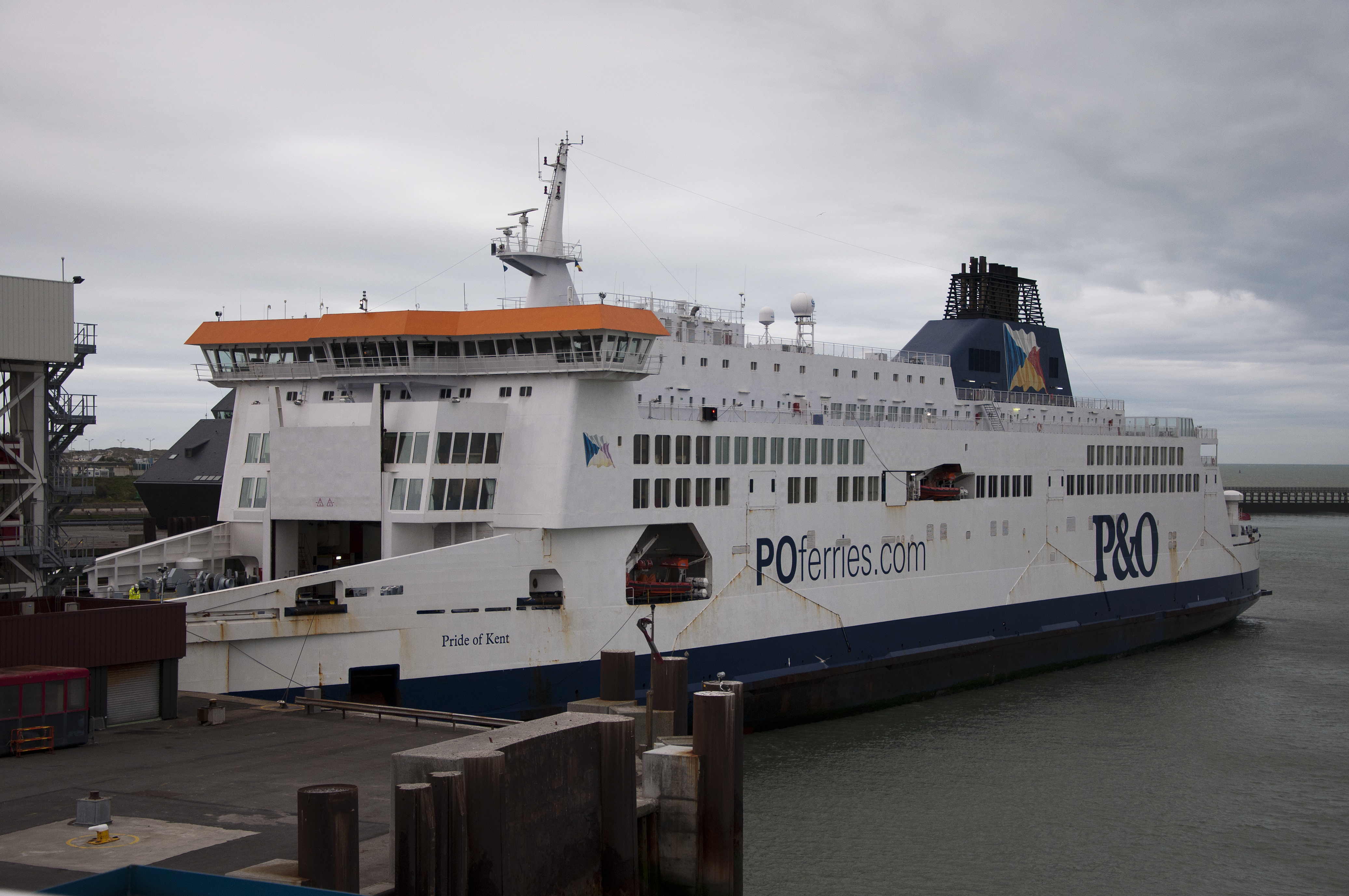 MS Pride of Kent - P&O Ferries, te Calais, Frankrijk